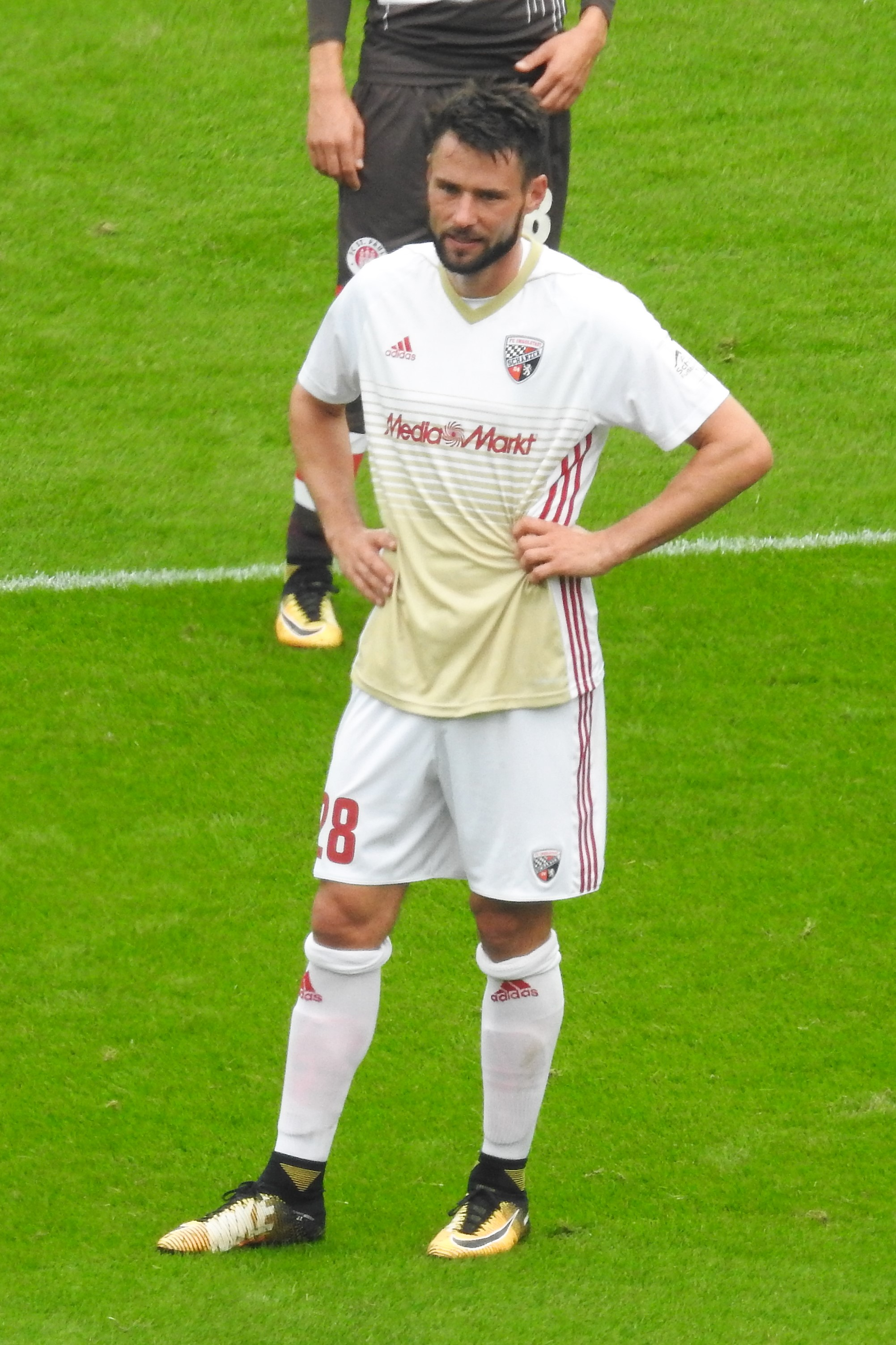 Träsch, Christian Ingolstadt